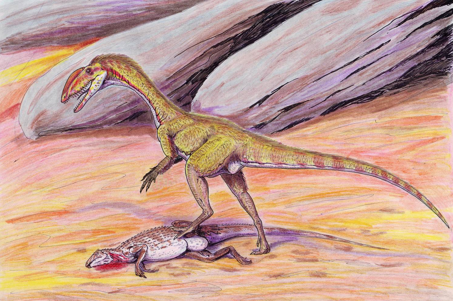 Megapnosaurus kayentakae (Syntarsus) feeding on Scutellosaurus